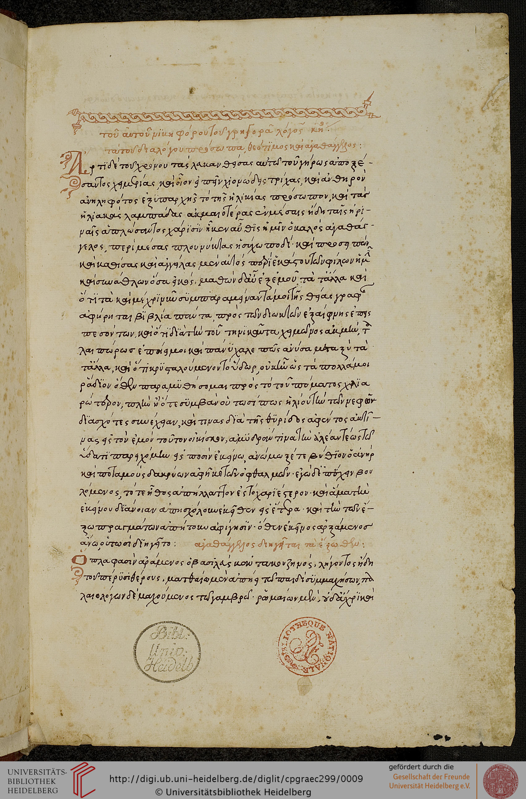 Byzantinisch-italienische Handschrift aus dem 15. bzw. der 1. Hälfte des 16. Jahrhunderts, bezeichnet als Codex Palatinus graecus 299 aus der Universitätsbibliothek Heidelberg. Inhalt ist die Byzantina historia des Nikephoros Gregoras, hier folium 1 recto. Digitalisat gefördert durch die Gesellschaft der Freunde Universität Heidelberg e. V.